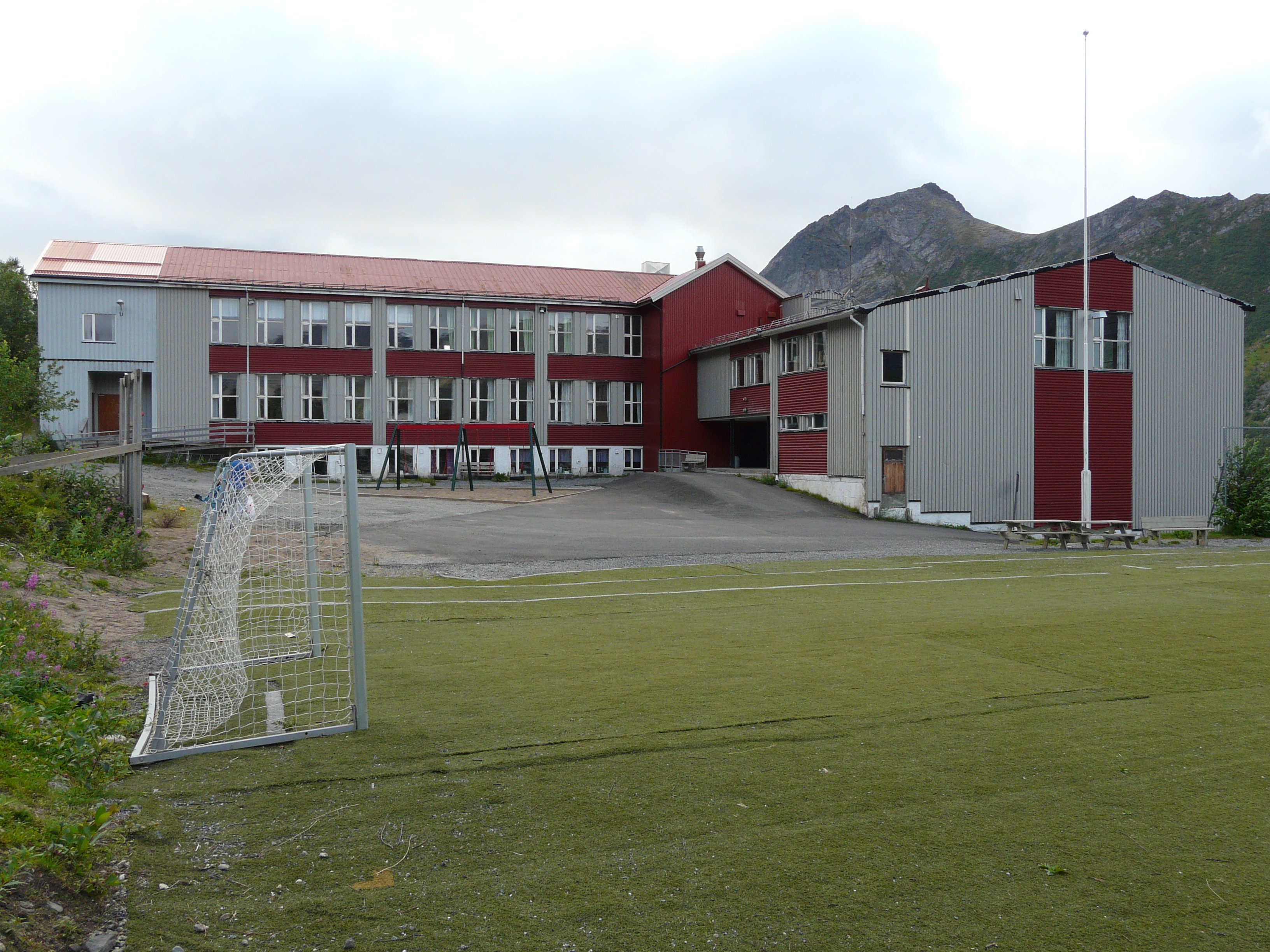 Gryllefjord barne- og ungdomskule i 2009.